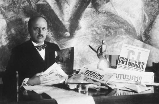 1909年發表未來主義時的新聞照片, 已過50年, 來源